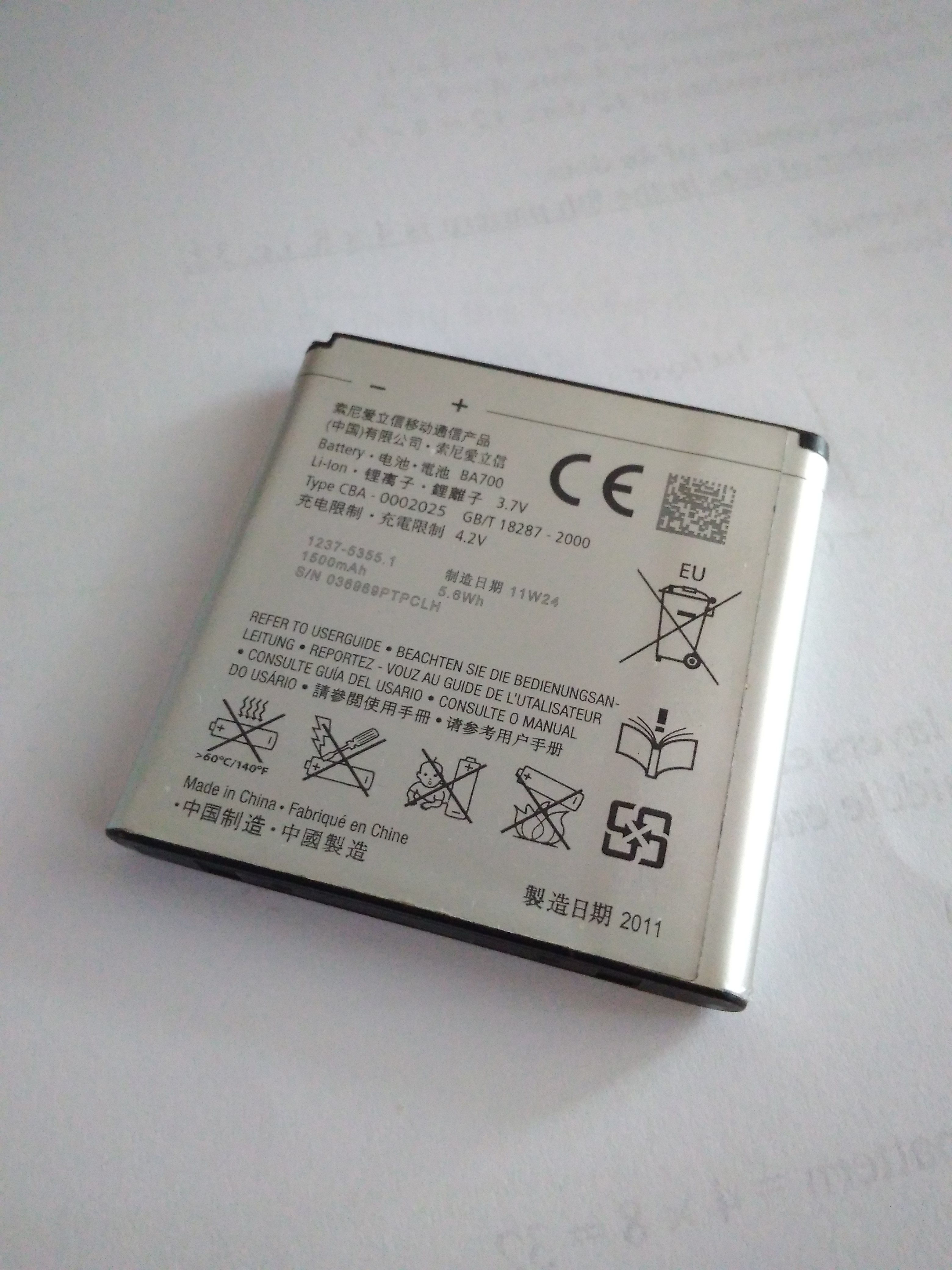 反